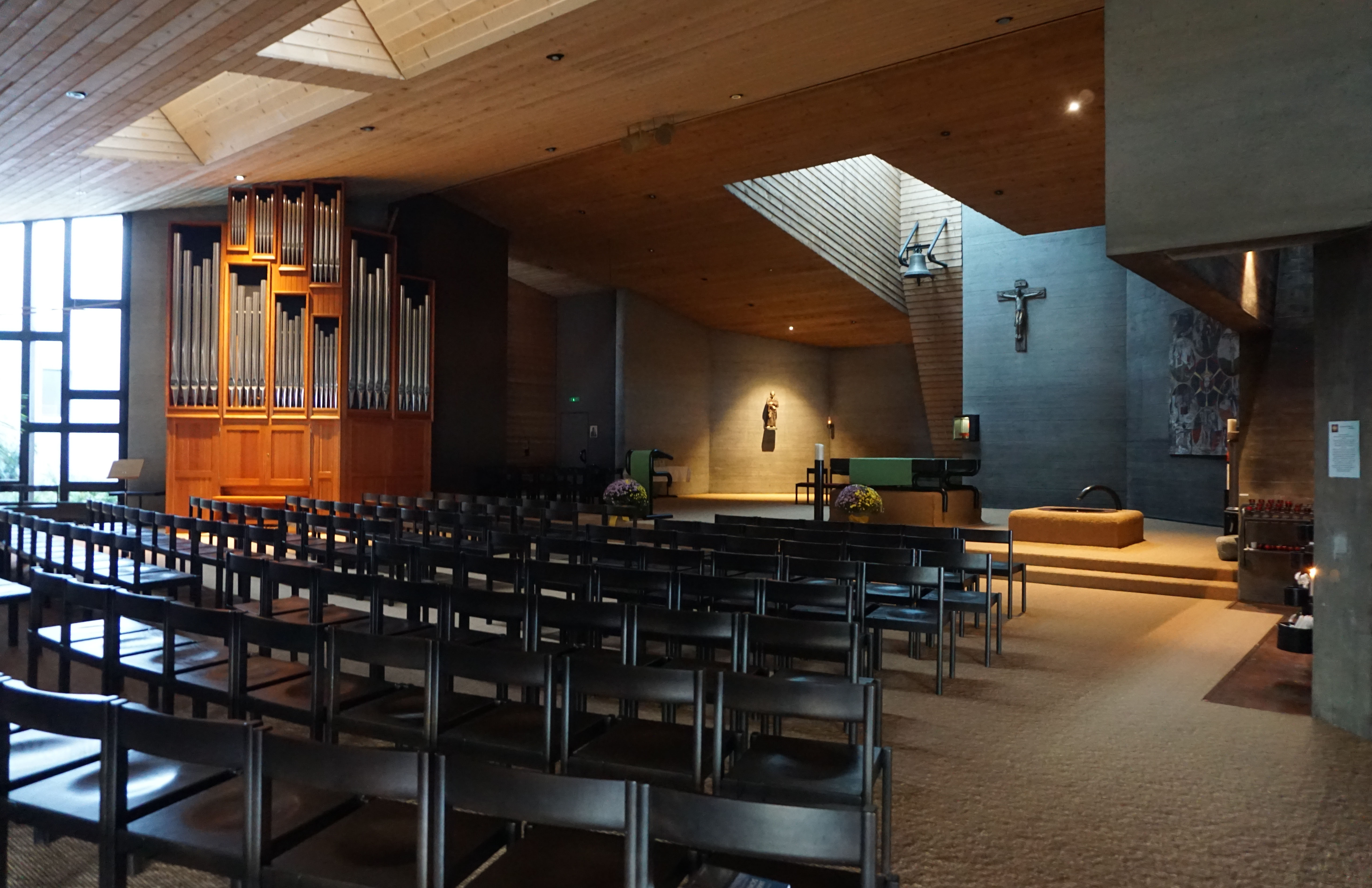 Bruder Klaus Kirche Spiez, Innenraum